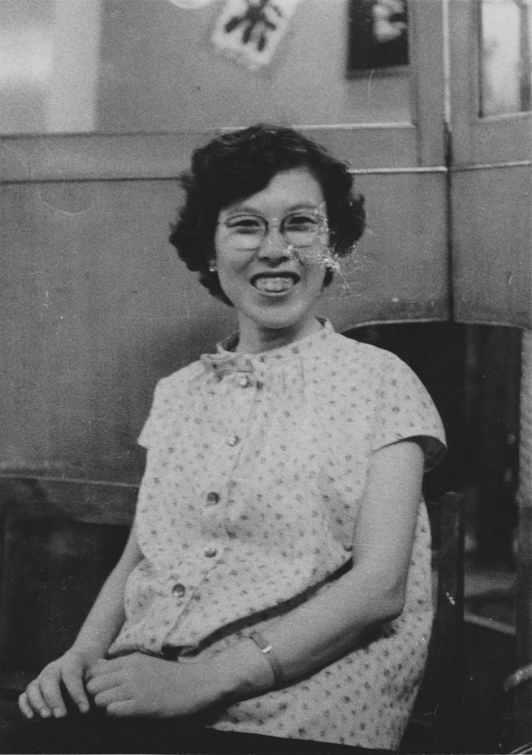 長男を身籠った頃